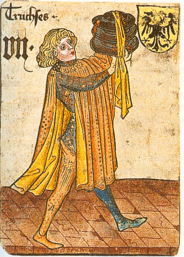 Truchsess Kartenspiel (möglicherweise aus dem Besitz Ladislaus Postumus)